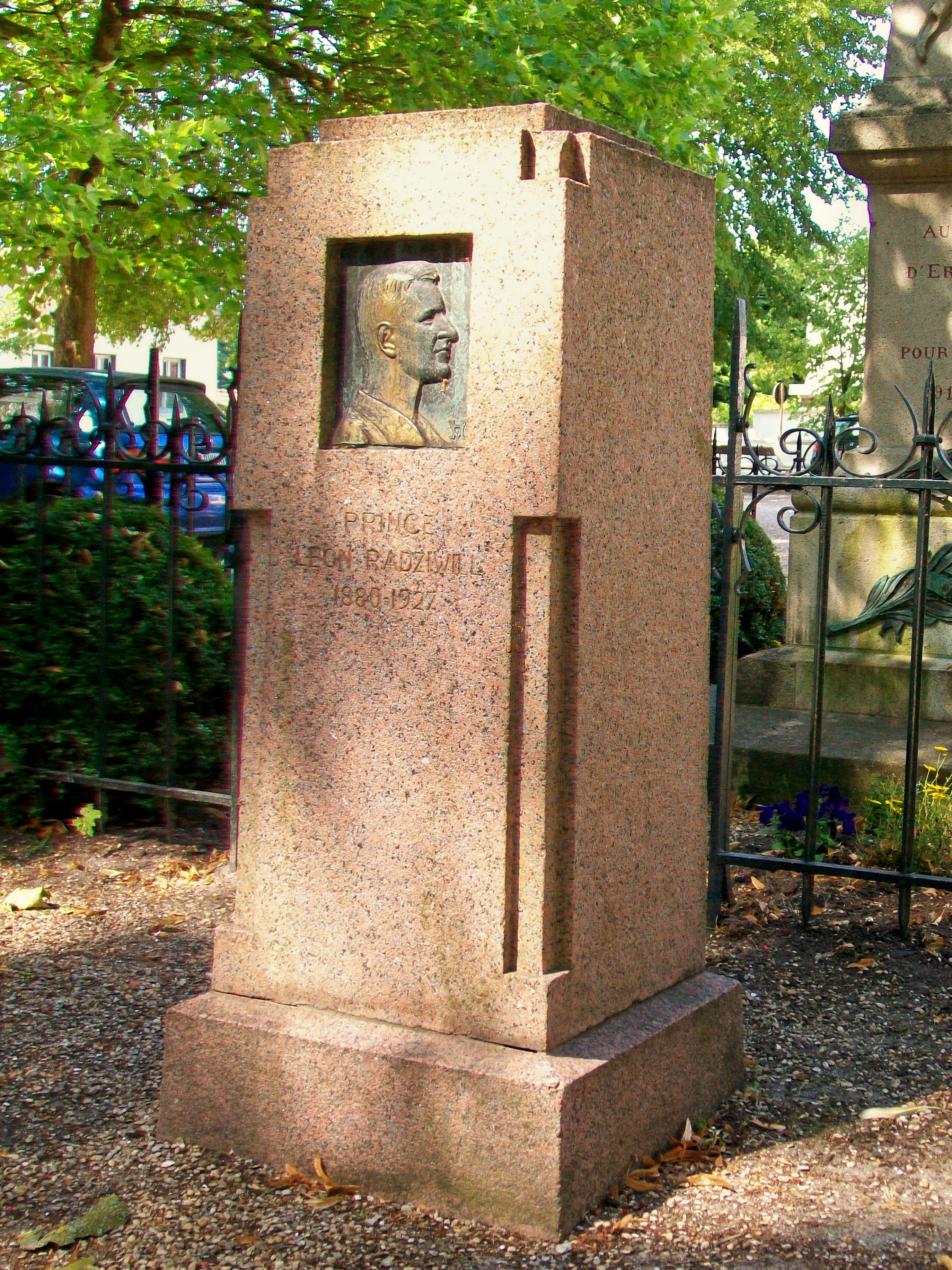 Monument pour le prince Leon Radziwiłł (1880-1927) sur la place de la mairie d'Ermenonville (Oise, France).